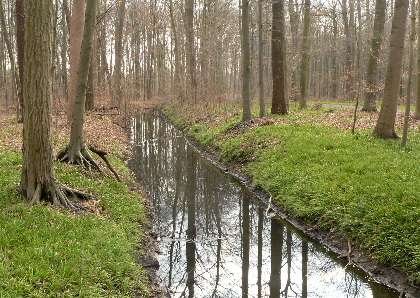 Schiffgraben in der Eilenriede